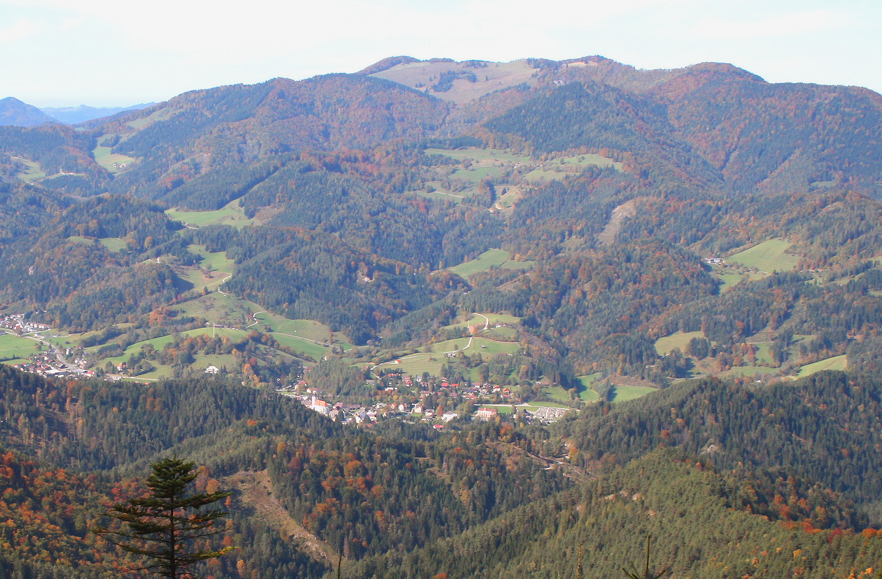 Türnitz und Eisenstein von Südosten (Anstieg zum Türnitzer Höger)